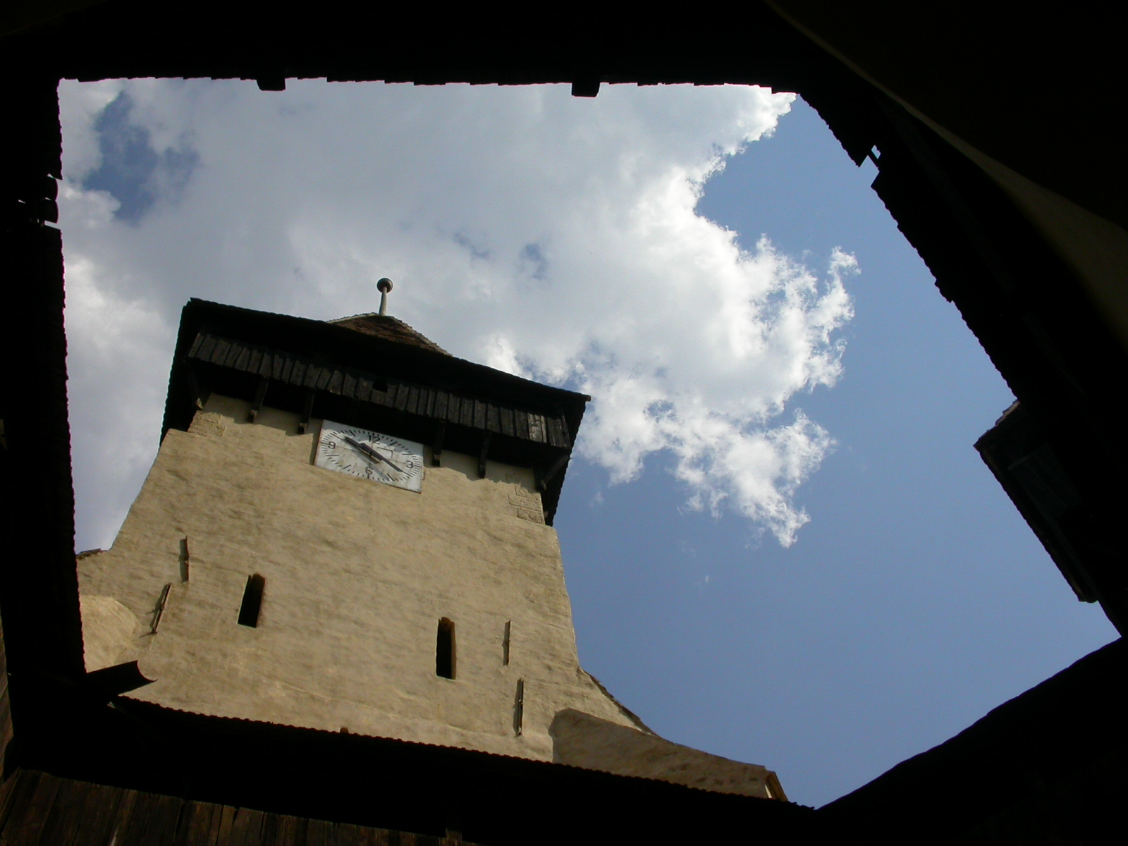 Ansamblul bisericii evanghelice fortificate, sec. XIV - XVII